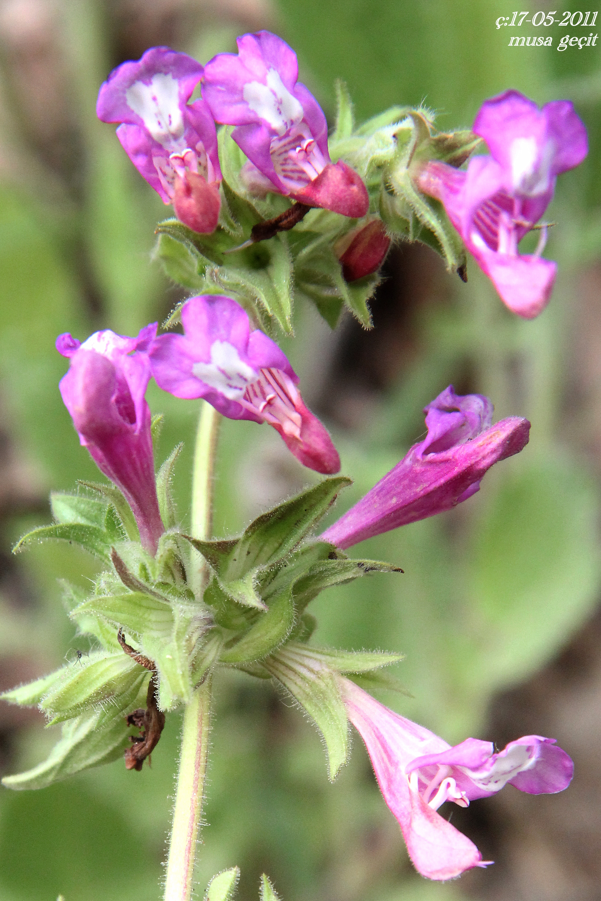 Yer:Mardin Salvia bracteata